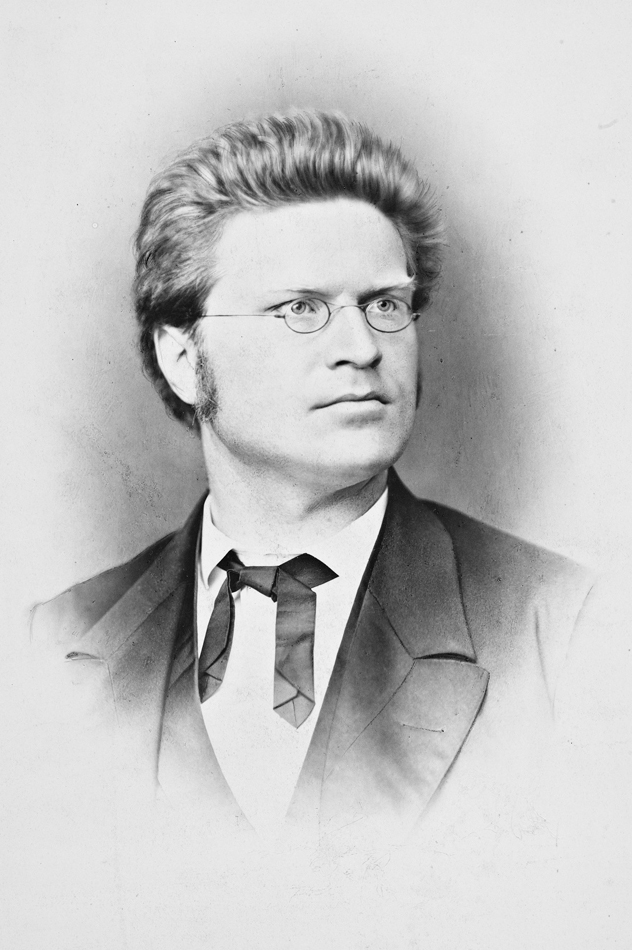 Bjørnstjerne Bjørnson, 1860. Tittel / Title: Bjørnstjerne Bjørnson, 1860. Dato / Date: 1860 Fotograf / Photographer: Budtz Müller & Co. (København) Eier / Owner Institution: Nasjonalbiblioteket / National Library of Norway Lenke / Link: Bildesignatur / Image Number: no-nb_blds_01191